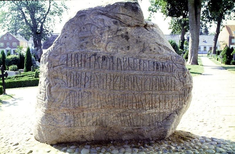 Jelling Kirke i Danmark. Den store Jellingsten